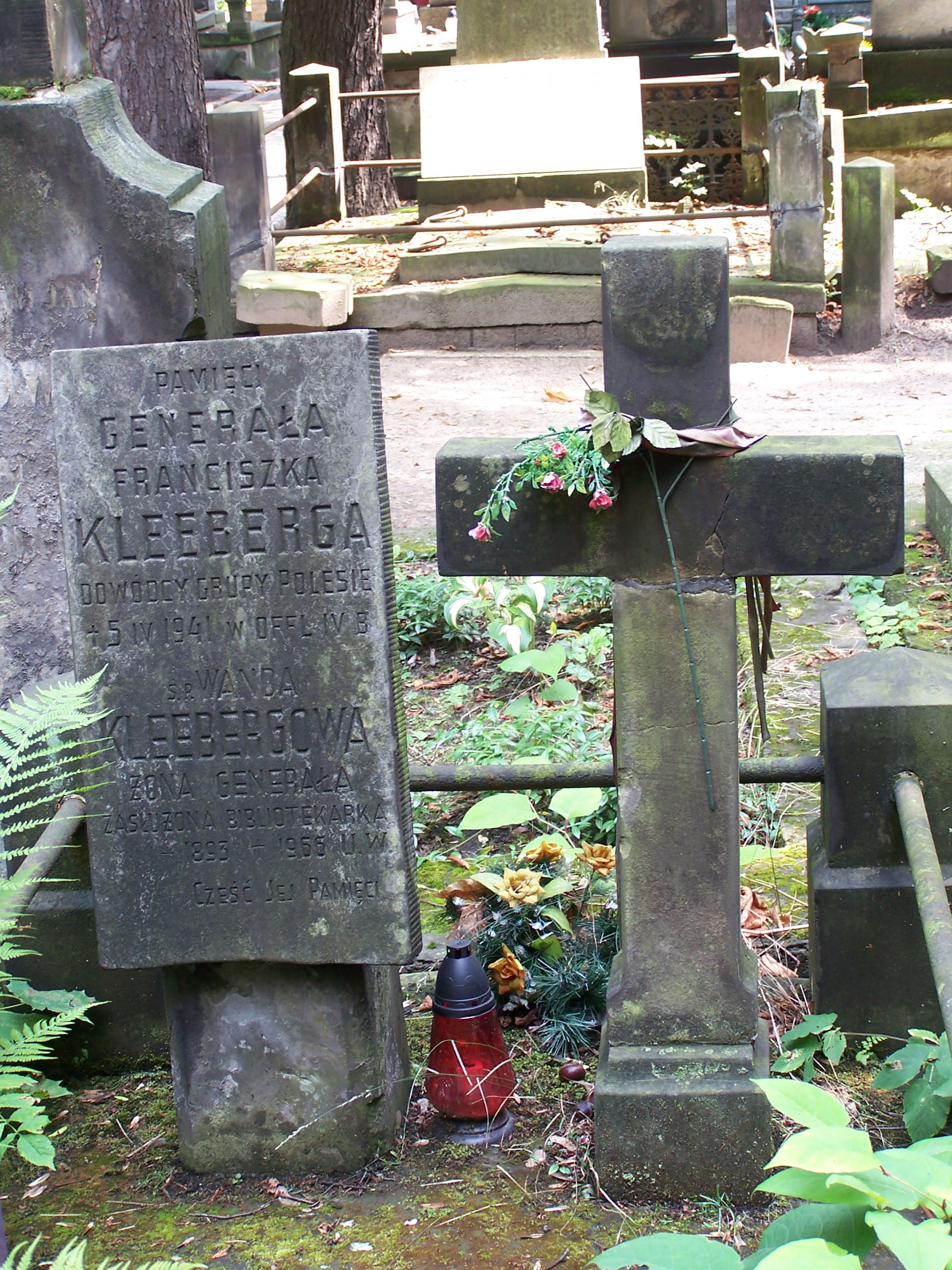 Symbolic grave of general Franciszek Kleeberg at Powązki Cemetery in Warsaw, Poland